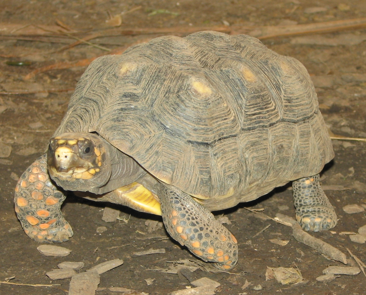 Geochelone carbonaria